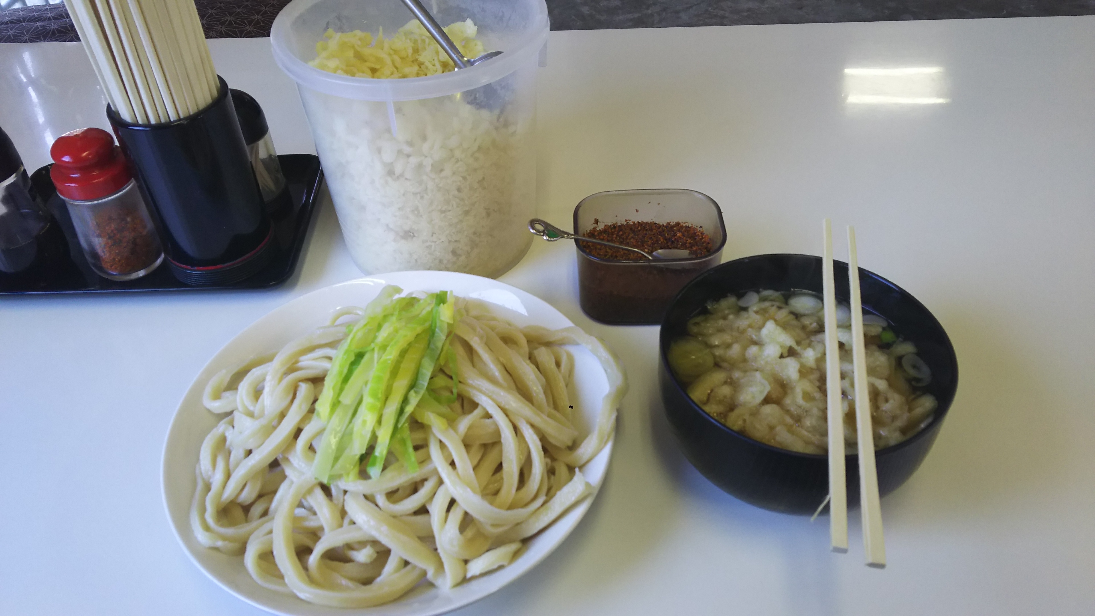 吉田のうどんの例。つけ麺大盛り。つけ汁はすまし仕立て。キャベツと揚げ玉が付け合わせ。つゆ椀奥にあるのが、薬味のすりだね。